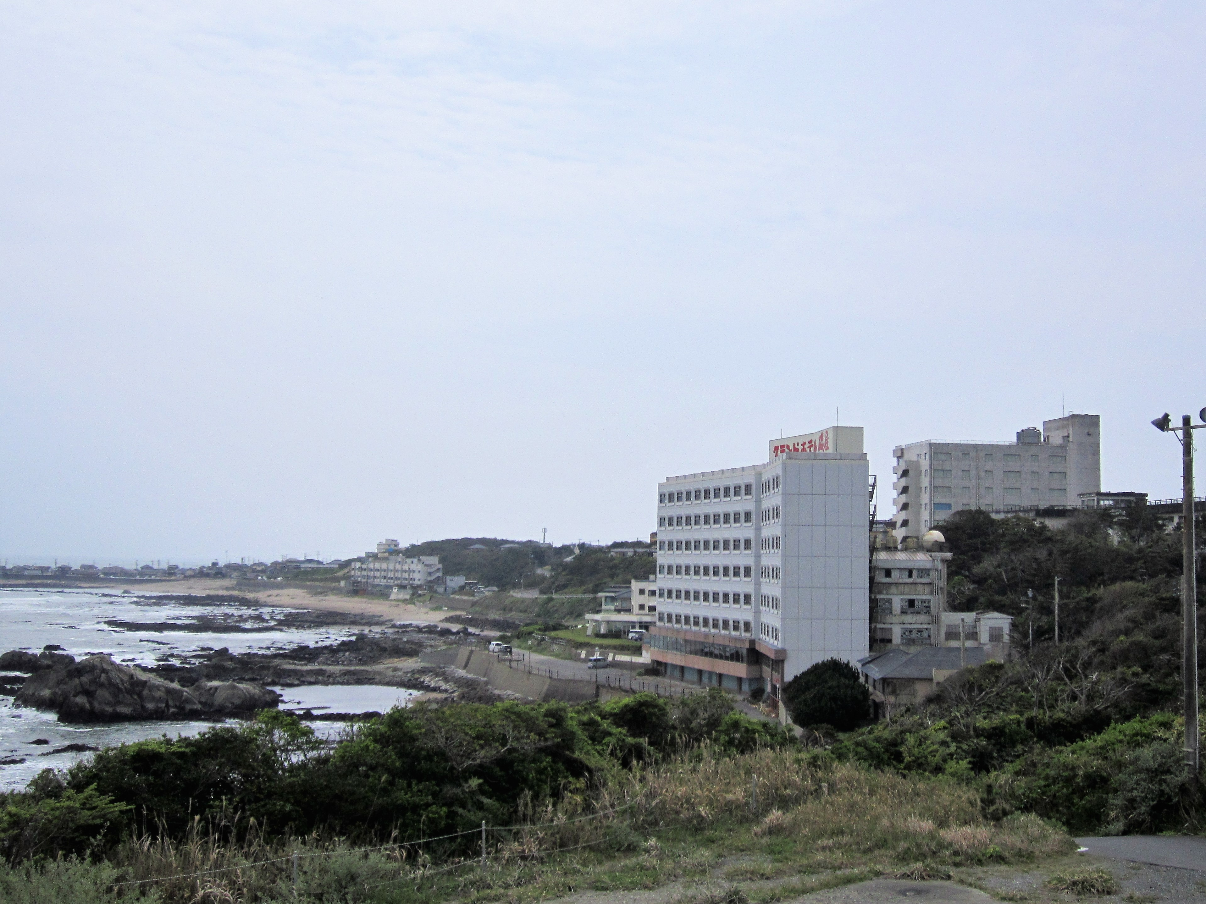 犬吠埼温泉（中央のグランドホテル磯屋は廃業） Canon PowerShot A2200